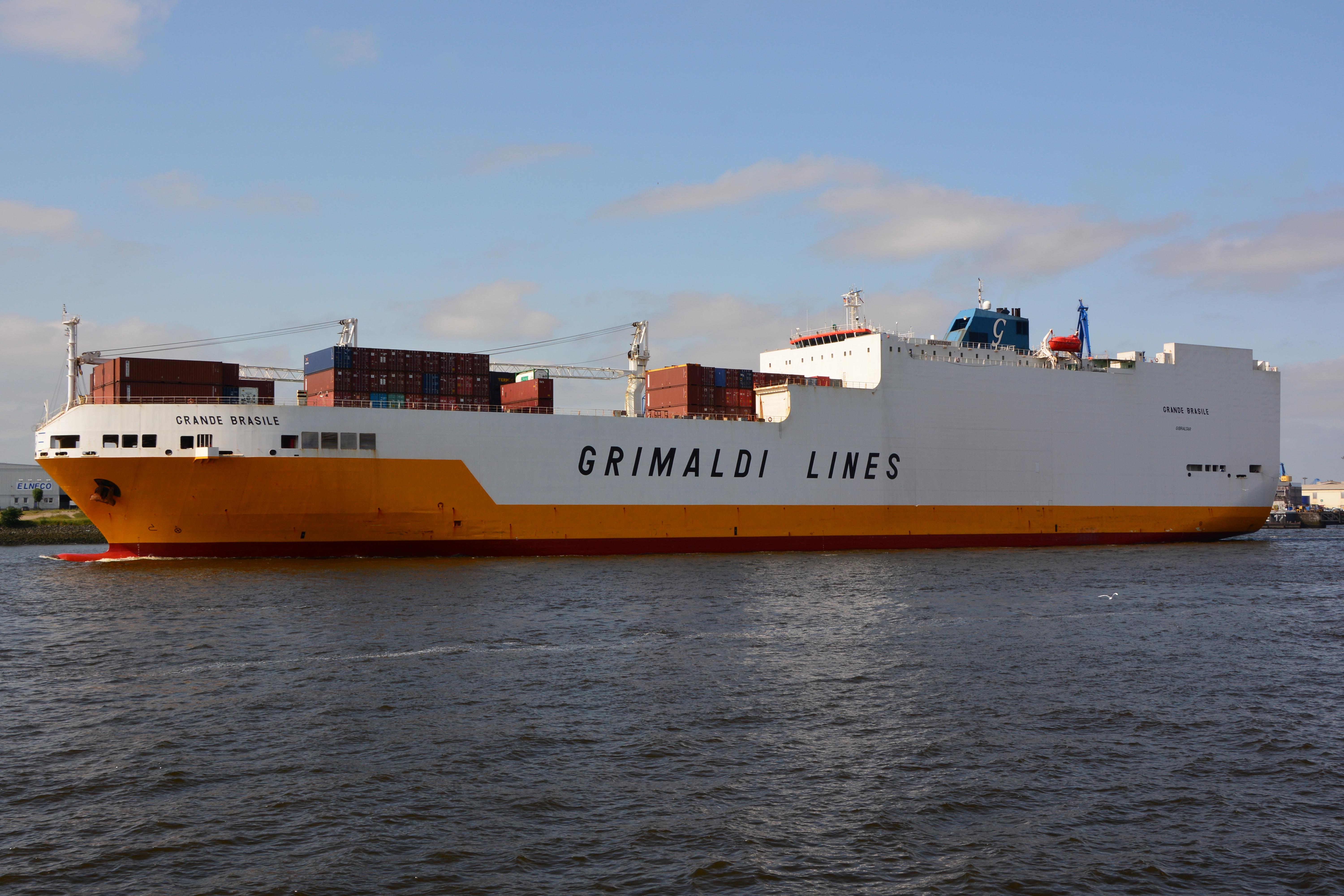 Das RoRo / ConRo-Schiff Grande Brasile im Hamburger Hafen